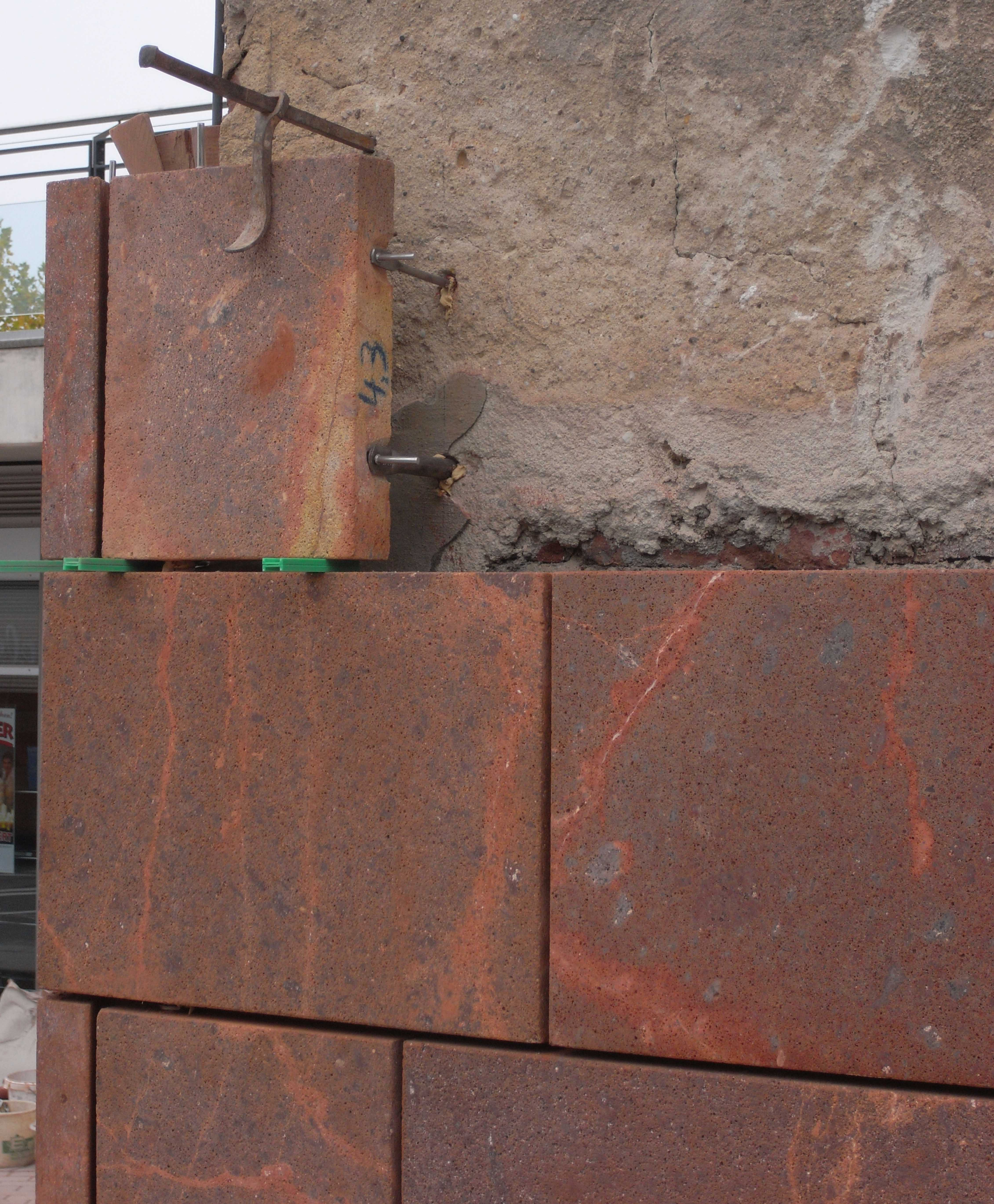 Chemnitz, Montage einer Fassade mit “Rochlitzer Porphyr” (Sachsen, Deutschland)